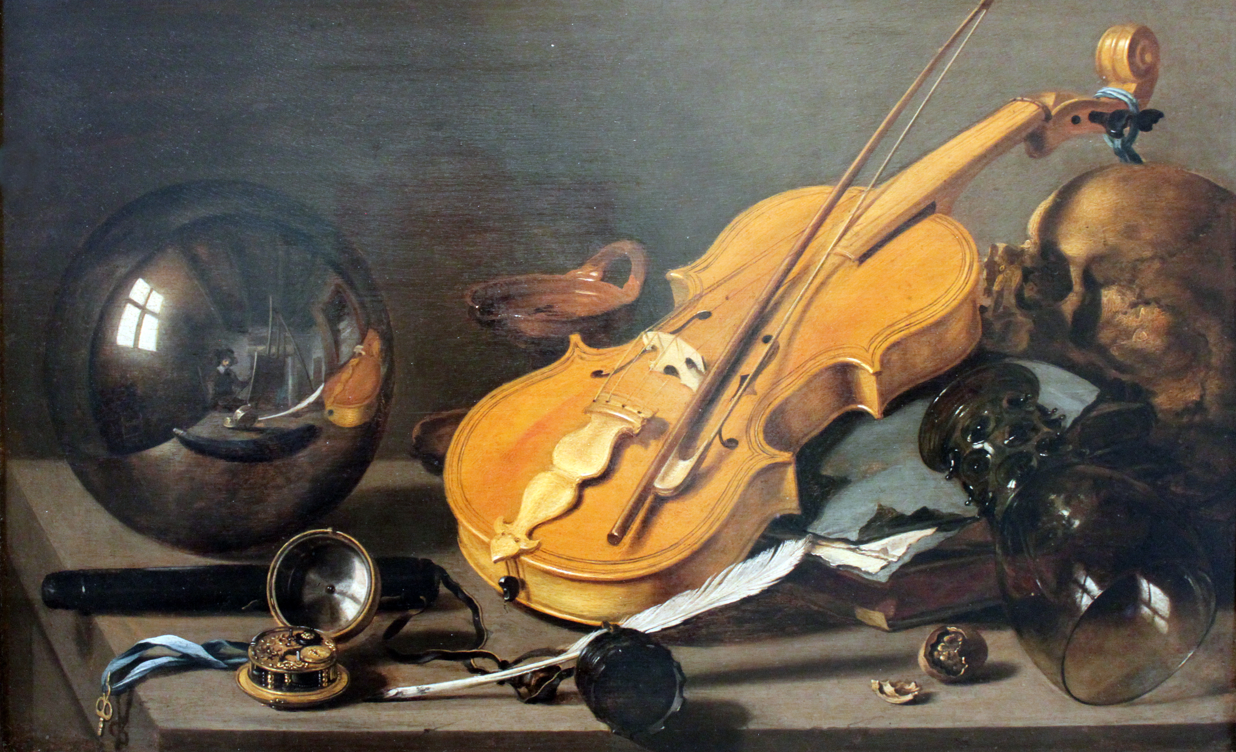 Auf der Tischplatte eines schräg ins Bild ragenden Holztisches vor dunklem Hintergrund liegen verschiedene Gegenstände. In der Spiegelung in der Glaskugel wird der Raum des Malers gezeigt, in dem dieser vor seiner Staffelei sitzt. In der Mitte des Bildes, liegt eine wegen der der doppelten Randeinlage flämische Geige mit Steckfroschbogen auf einem Bücherstapel. Rechts davon sind ein Totenschädel und ein umgestürzter Römer mit Noppenschaft, daneben eine aufgebrochene Walnuß. Hinter dem Musikinstrument steht eine Öllampe, vorne links liegt eine Uhr mit Schlagwerk. Darum sind ein Tintengefäß, eine Schreibfeder und ein Lederetui gruppiert. Der Schlüssel der Uhr und die Schreibutensilien überragen die Tischkante.